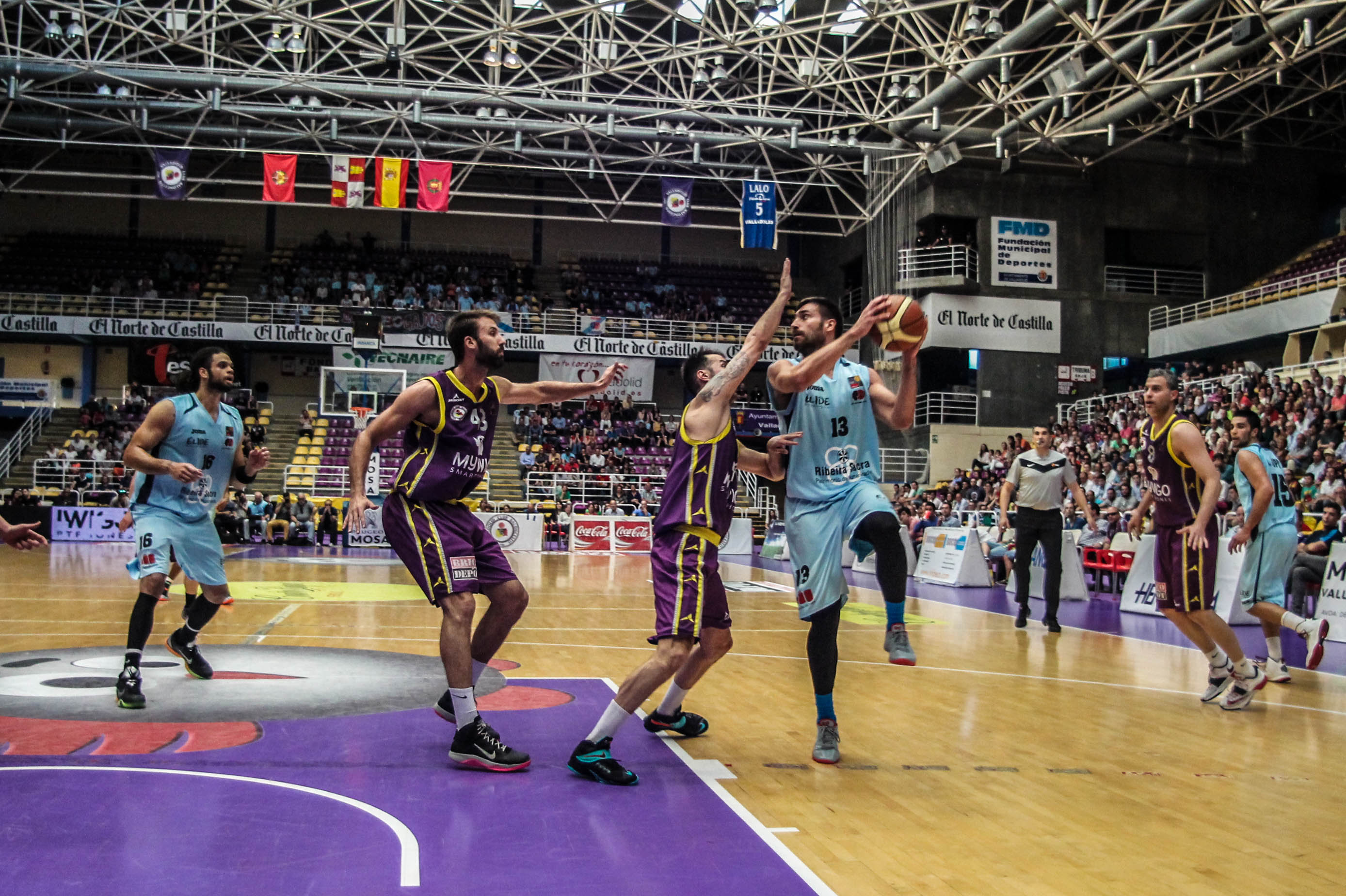 Partido entre C.B.Valladolid y C.B.Breogán en el polideportivo Pisuerga en Valladolid.